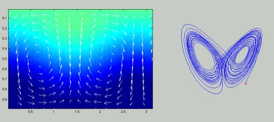 Konvektionsrollen, zugeordneter Zustand. erstellt von: F. Prill